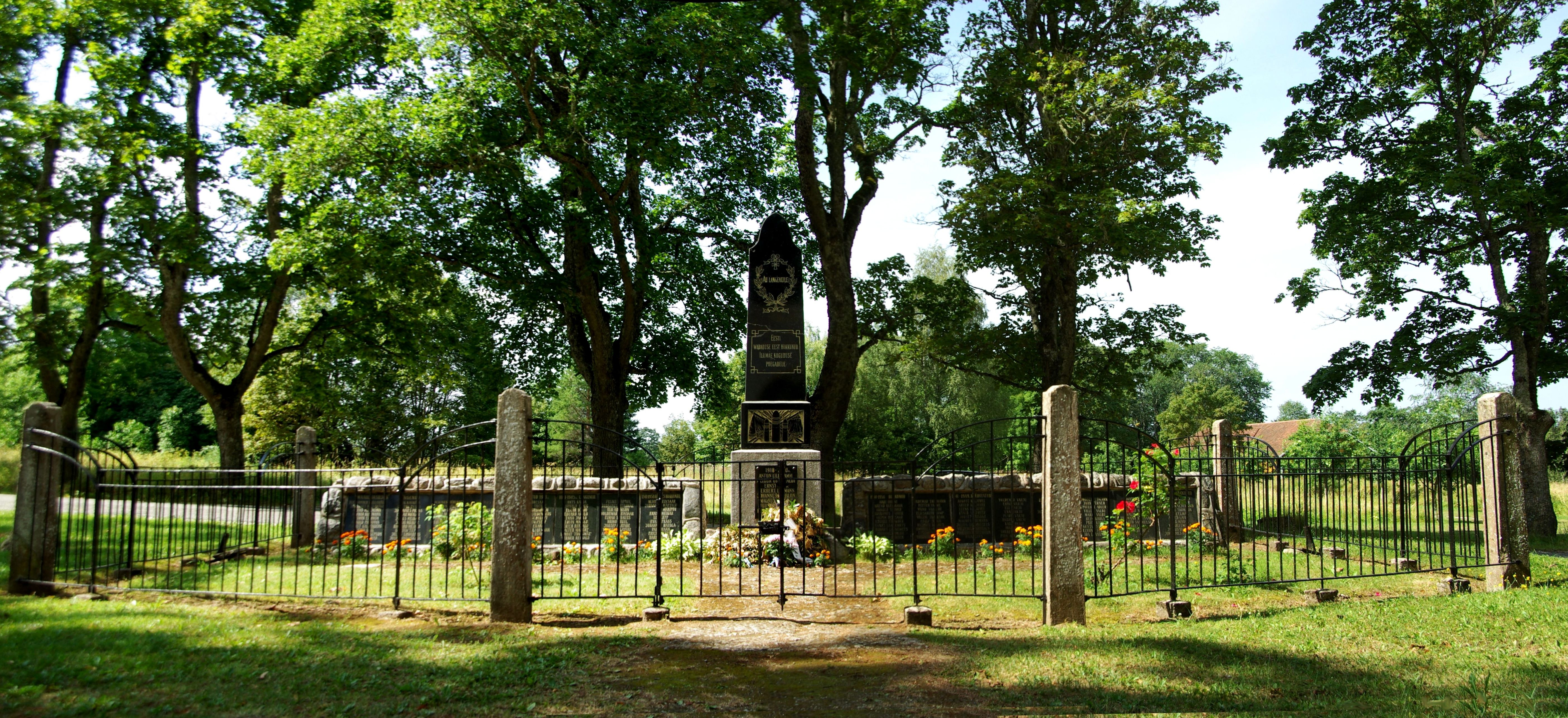 Vabadussõja mälestussammas